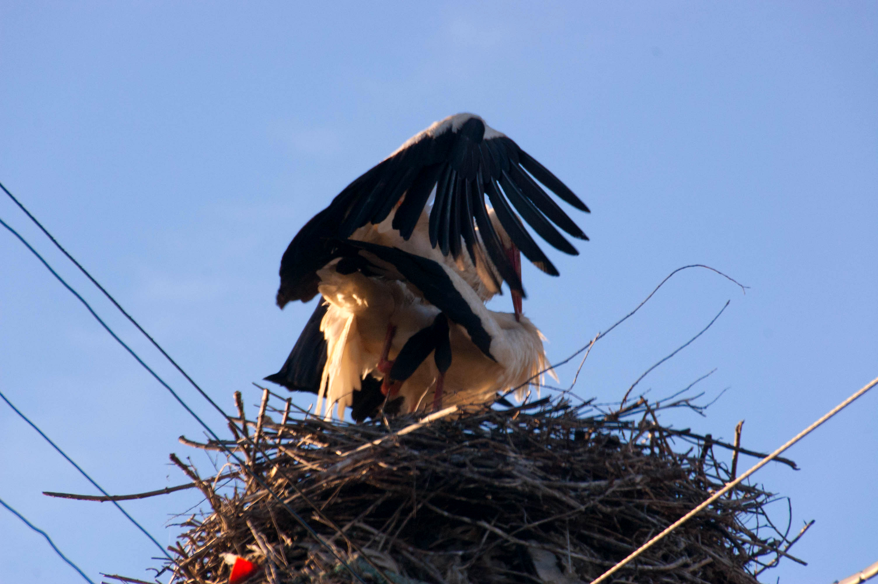 Srpski (latinica): Posle udvaranja roda, u martu ili aprilu, sledi parenje. Ženka snese 3 do 6 jaja. Rode grade jedno od najvećih i najtežih gnezda. Gnezda svijaju na krovovima, dimnjacima, zidovima, stogovima sena i slame, telefonskim stubovima, drveću, a ponekad i na zemlji.